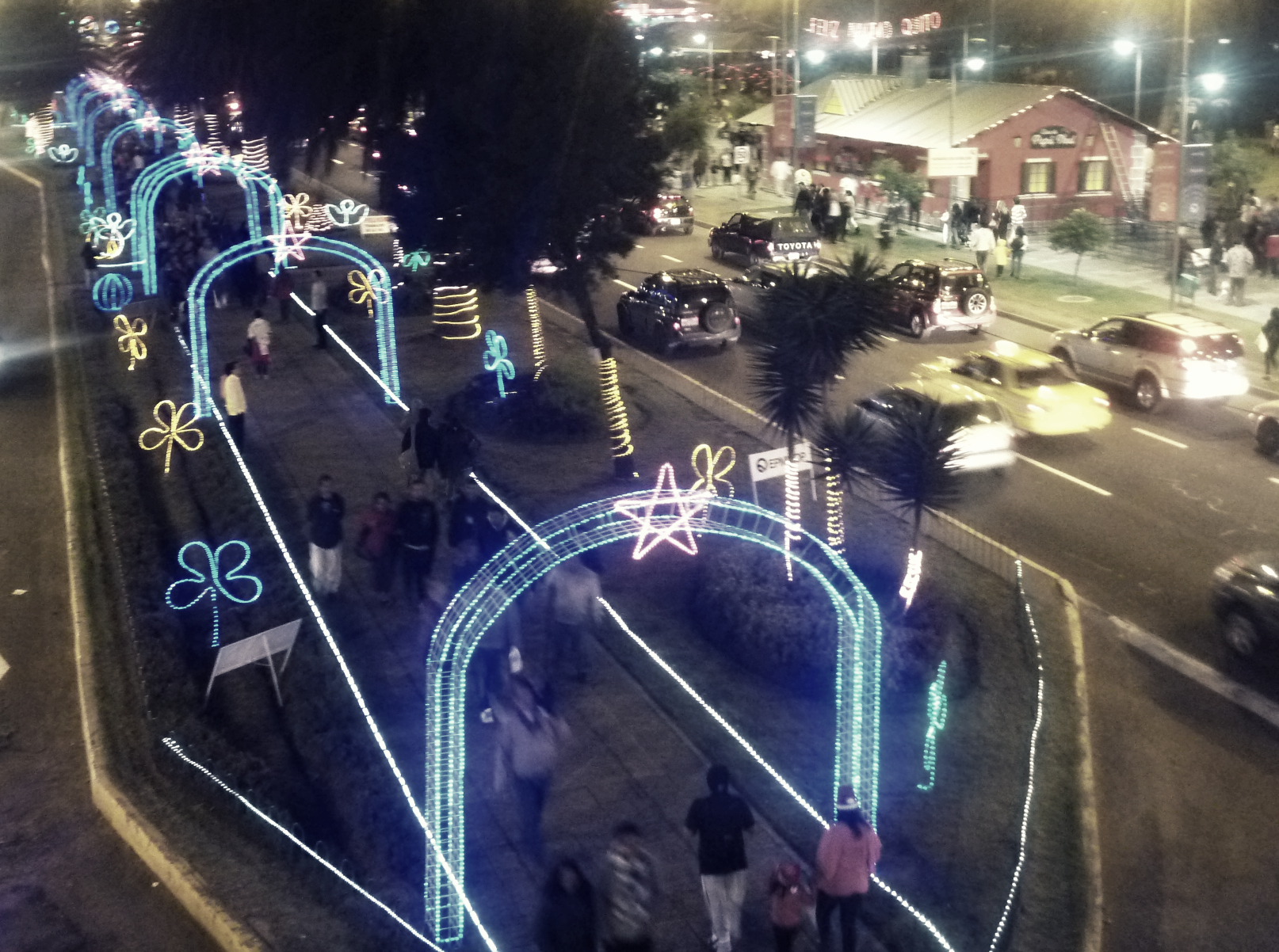 Luces navideñas instalas en el bulevar Naciones Unidas durante la navidad de 2013.